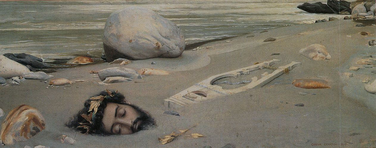 Gustave Courtois, Orphée - 1875. Huile sur bois. Pontarlier, Musée municipal